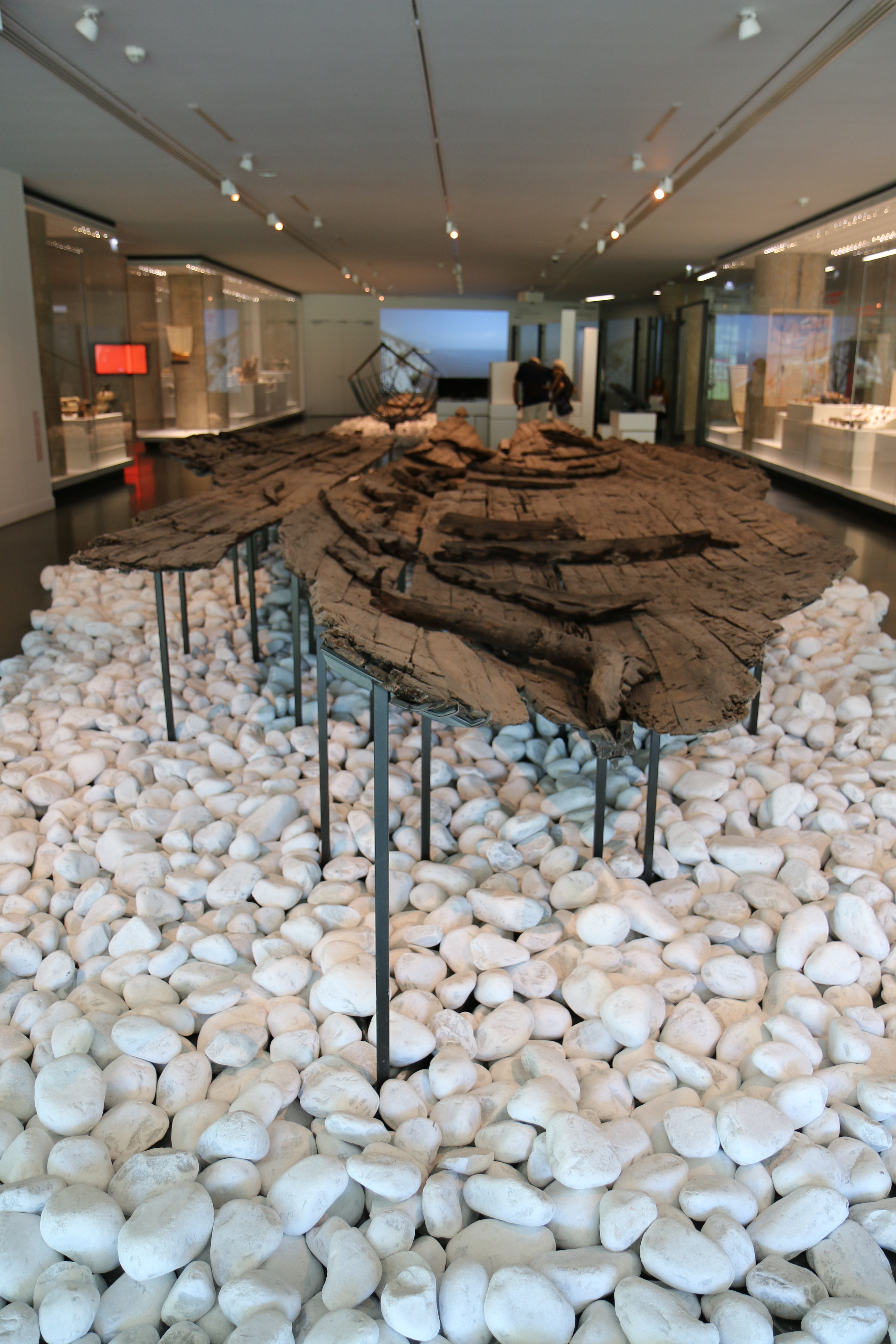 Épave grecque dite Jules-Verne 7 trouvée lors des fouilles effectuées à Marseille en 1993 place Jules-Verne.